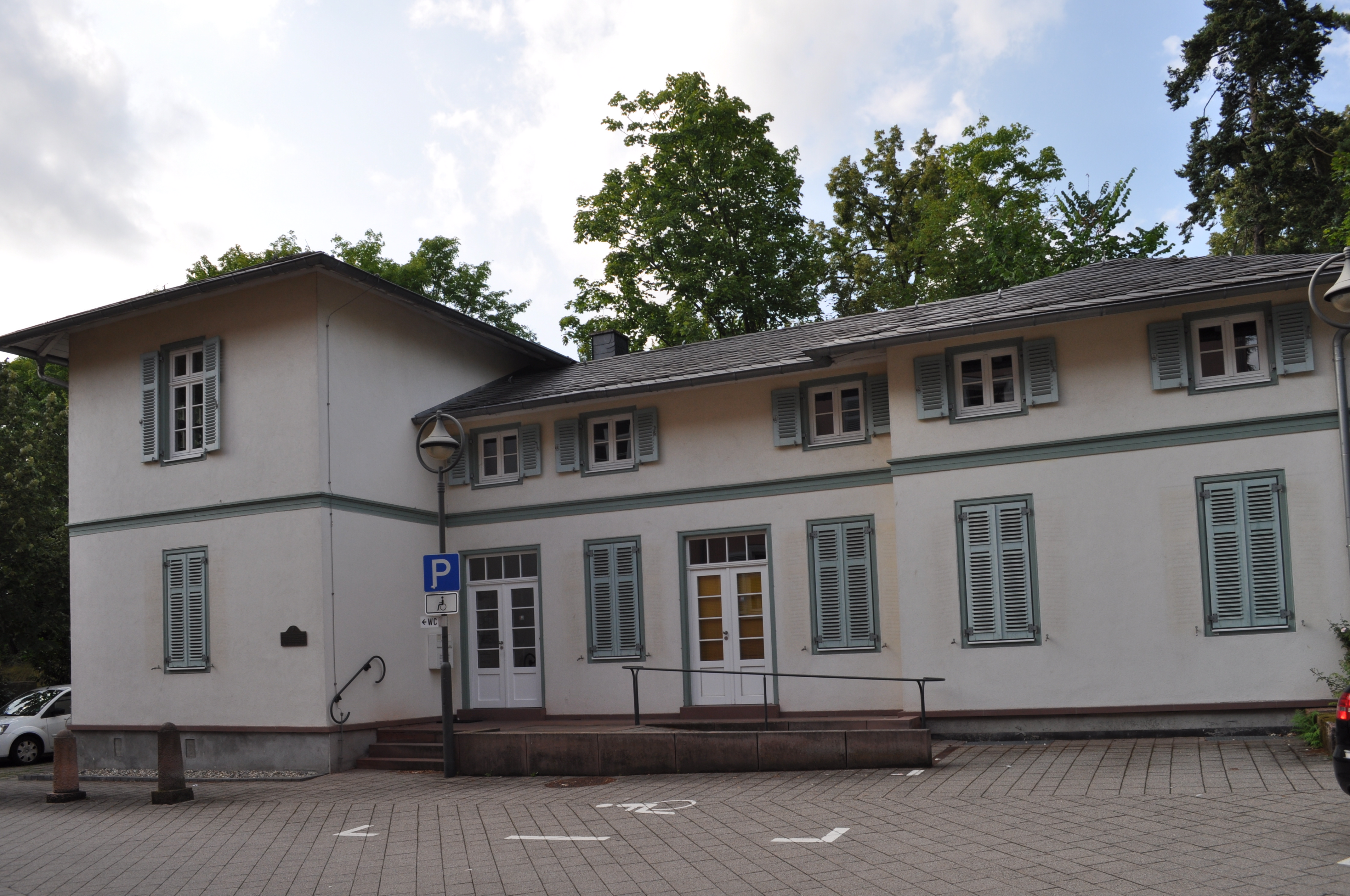 Remise des Paulinenschlösschens in Bad Soden